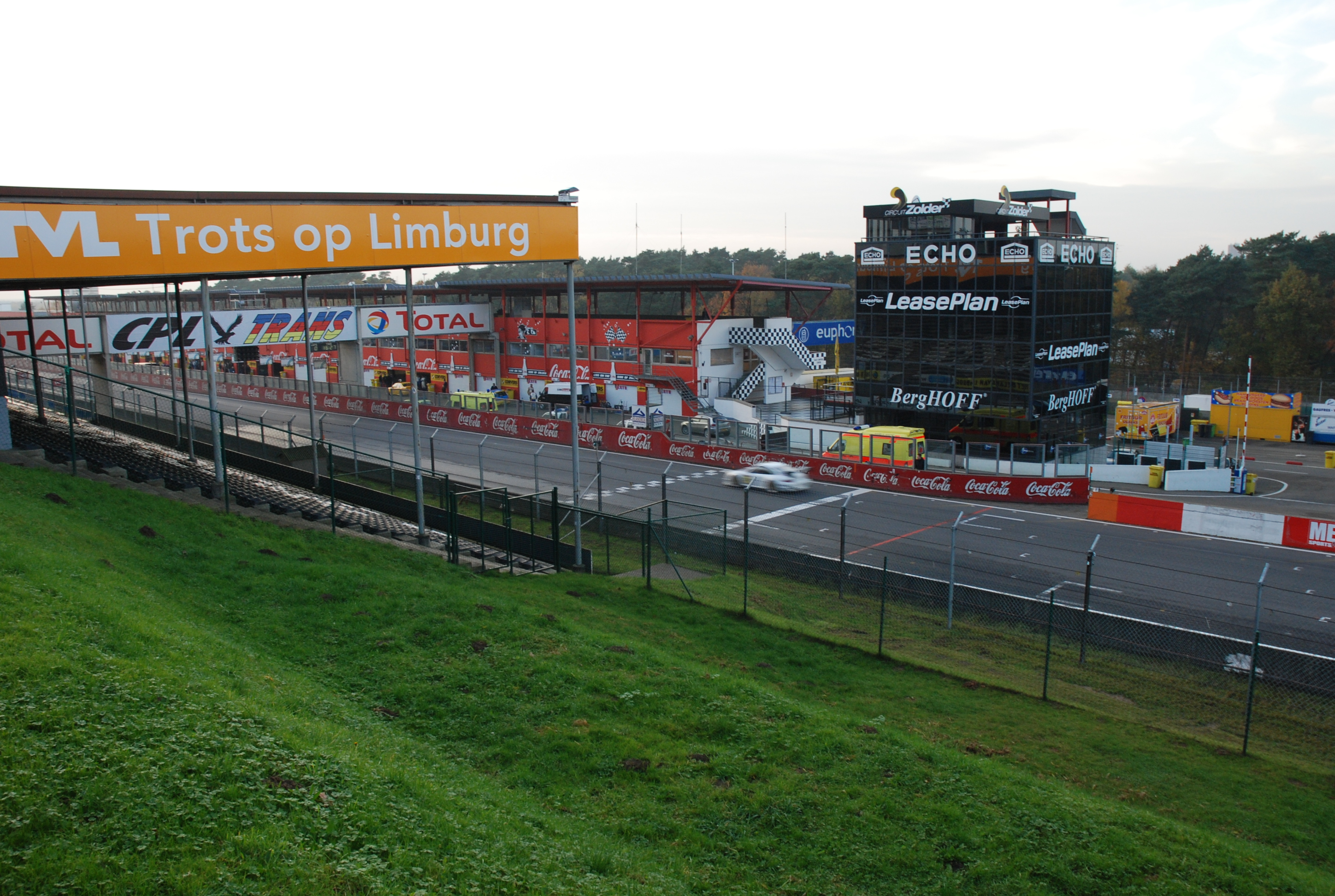 Circuit te Zolder, België